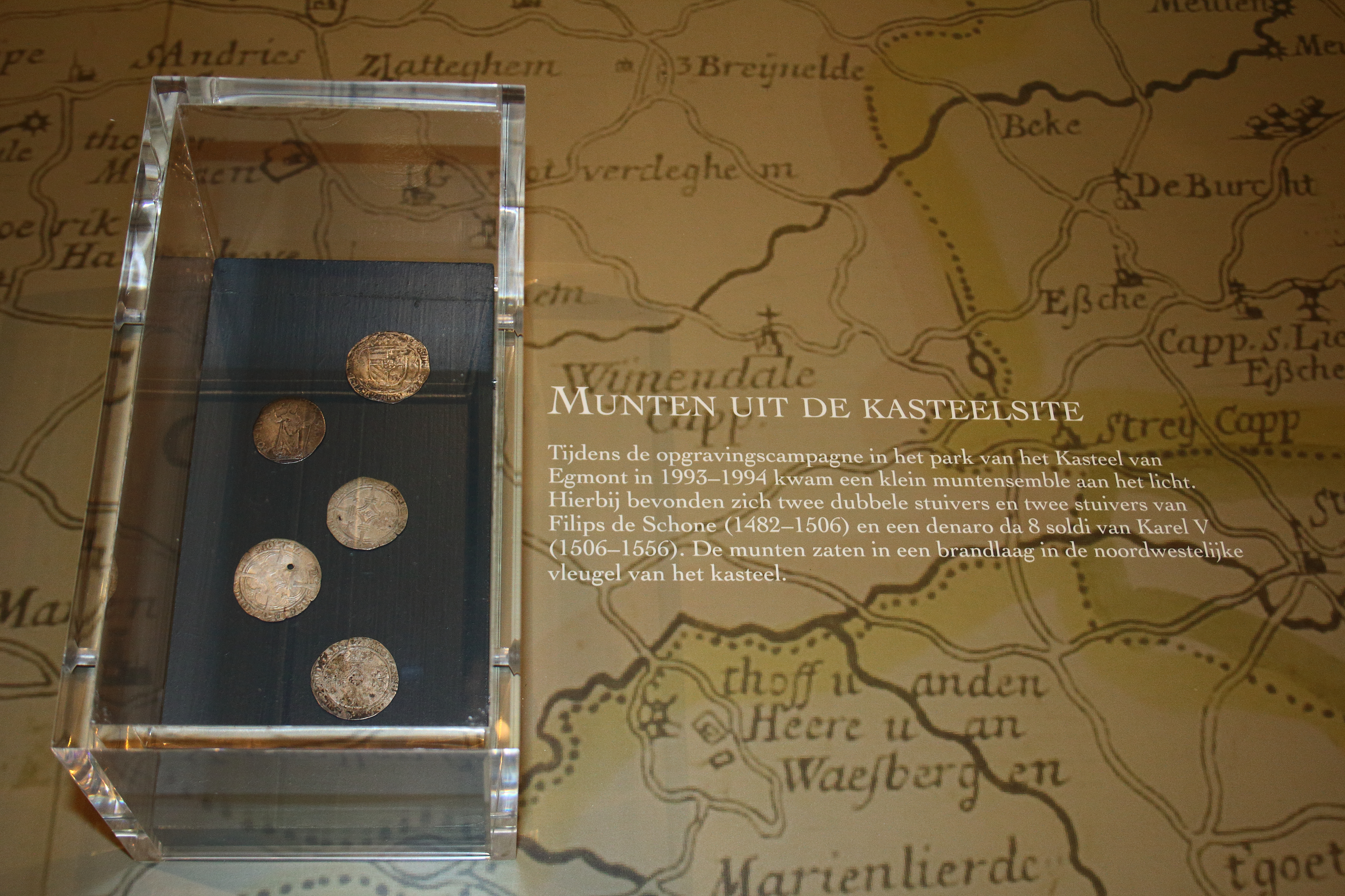 Munten opgegraven in 1994 in een brandlaag in de noordwestelijke vleugel van het Egmontkasteel in Zottegem: twee dubbele stuivers en twee stuivers van Flilips de Schone en een 'denaro da 8 soldi' van Karel V. Tentoongesteld in de 'Egmontkamer' van het Zottegemse stadhuis.